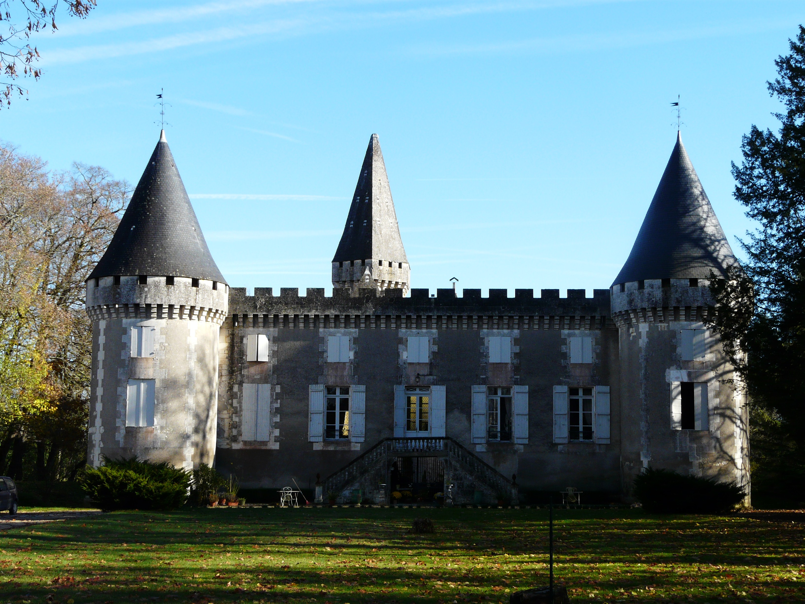 La façade ouest du château de la Borie Saulnier, Champagnac-de-Belair, Dordogne, France.